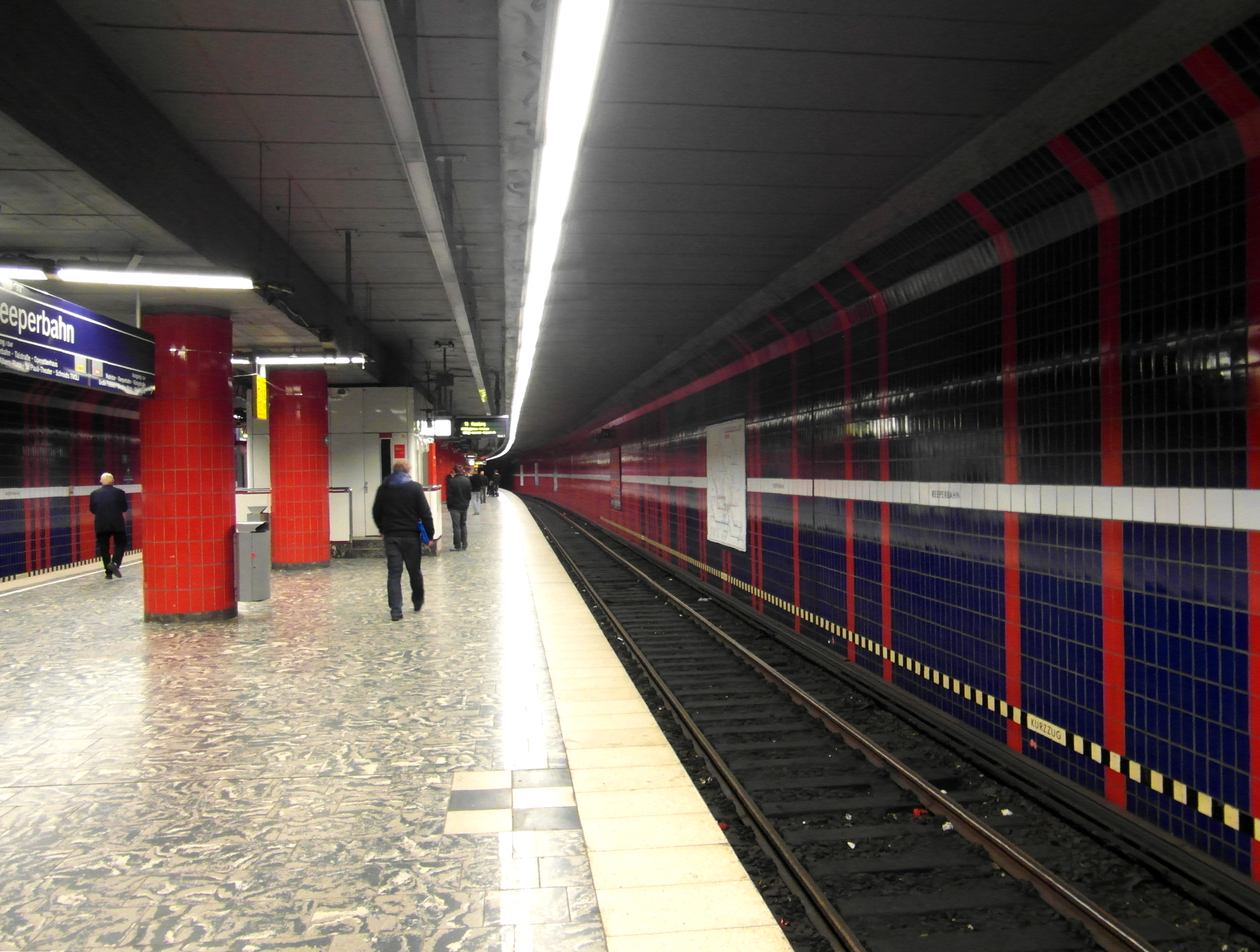 S-Bahnhof Reeperbahn in Hamburg